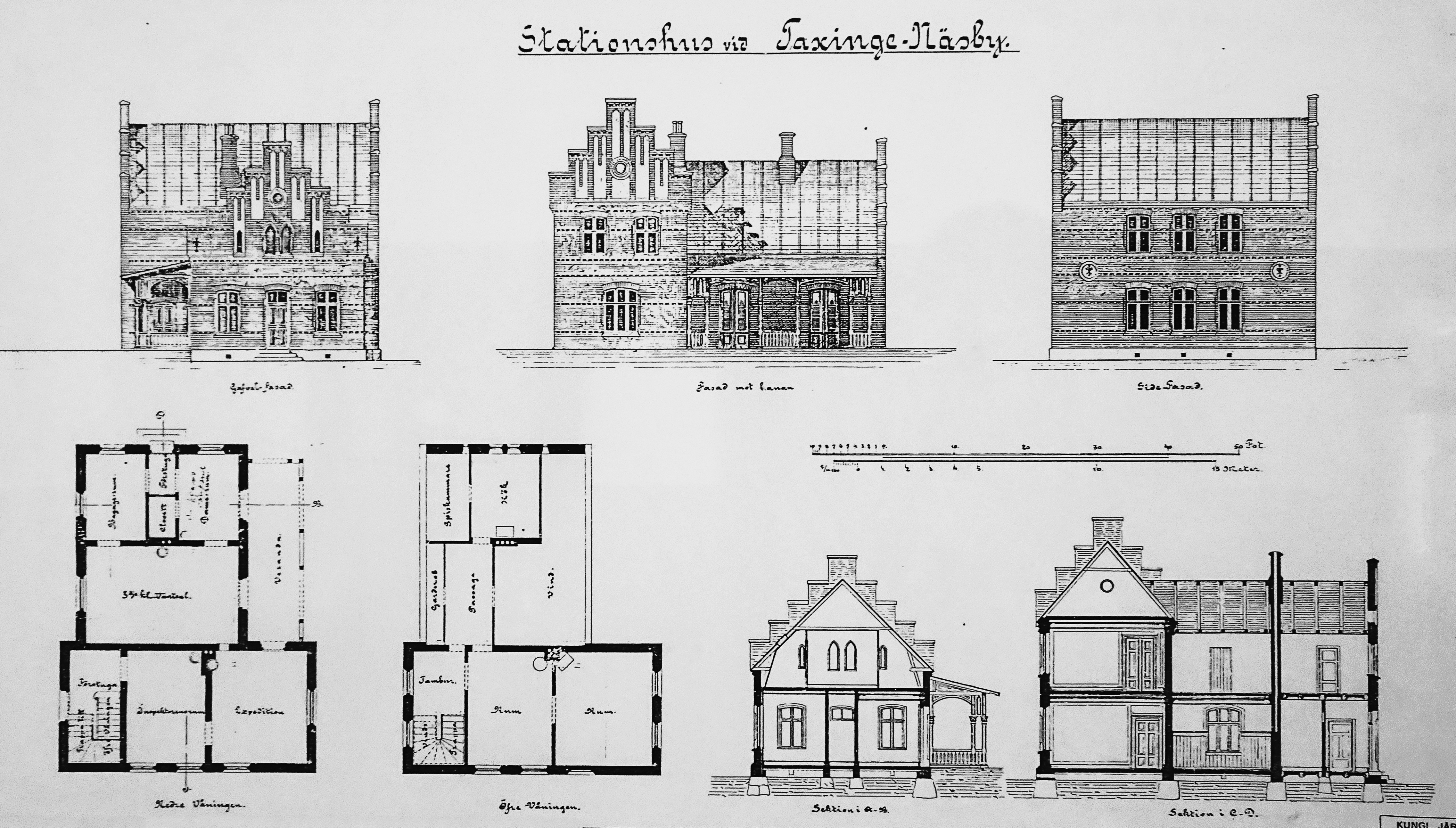 Stationshus Taxinge-Näsby, ritning